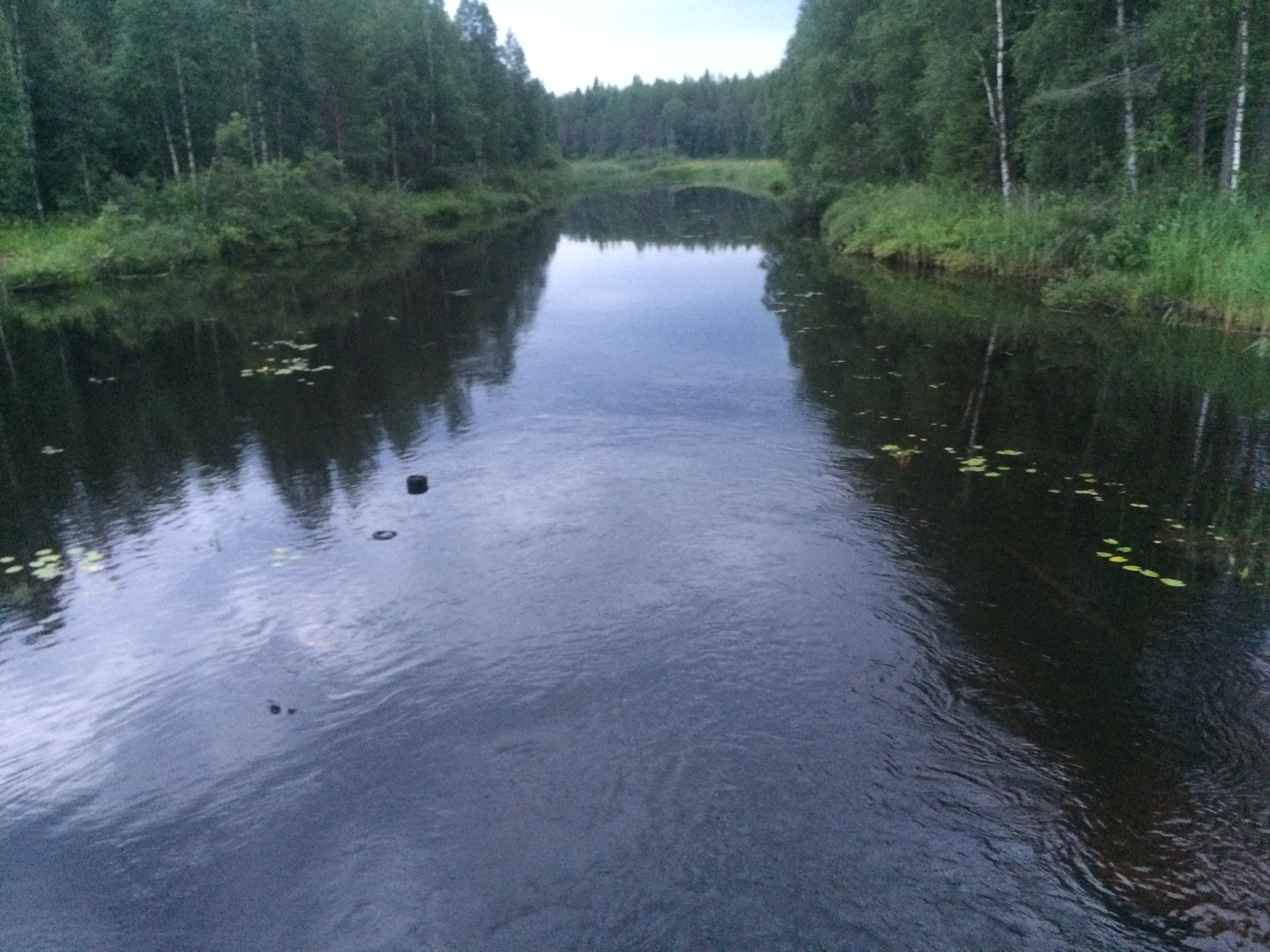 Семча